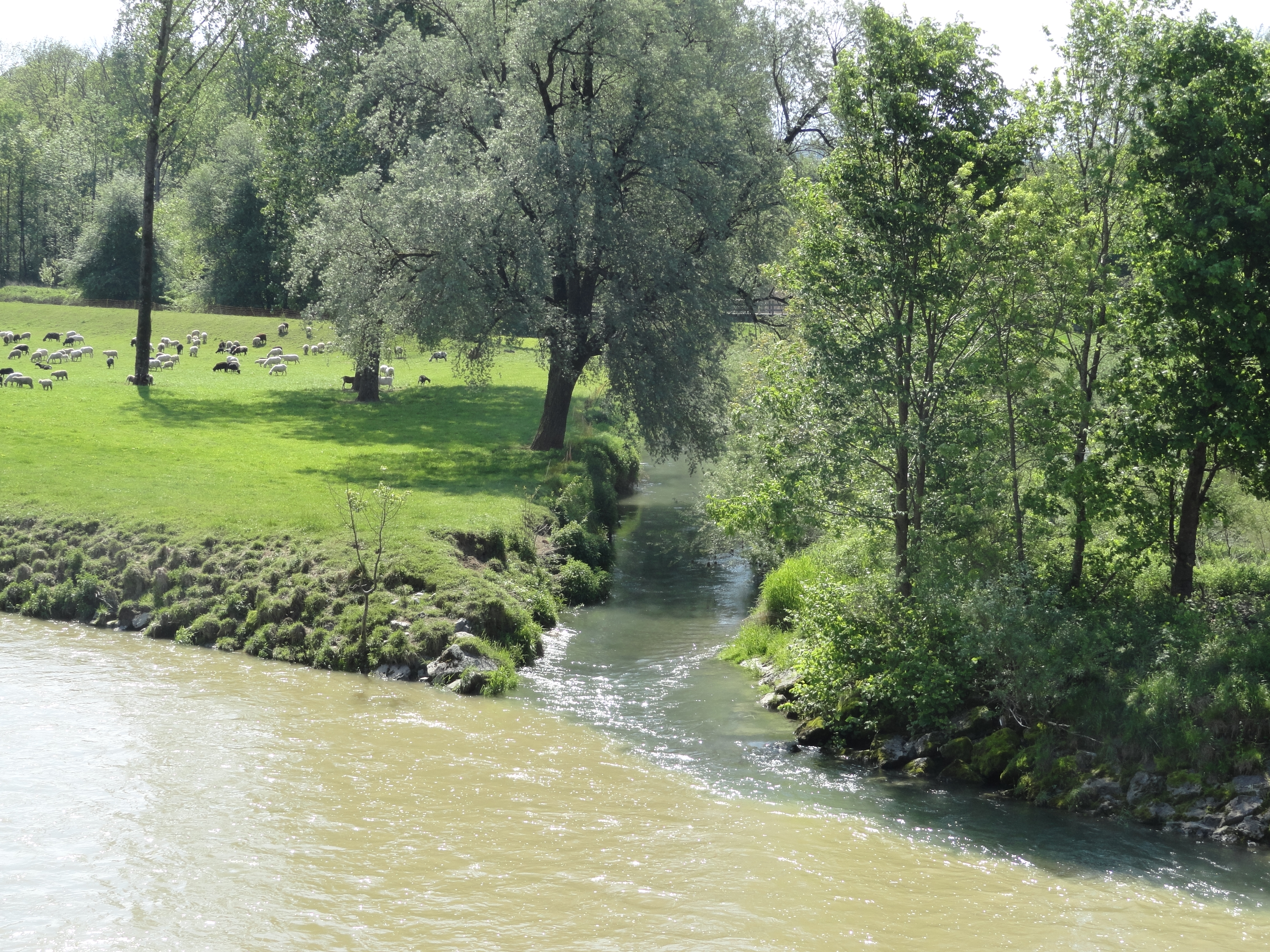 Mündung der Murg in die Thur bei Warth